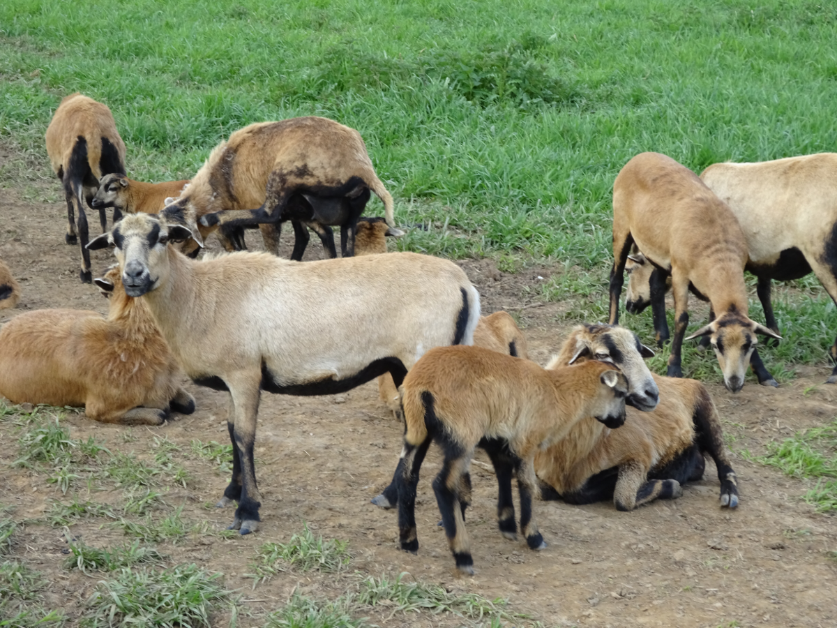 Kameroenshapen met lammeren